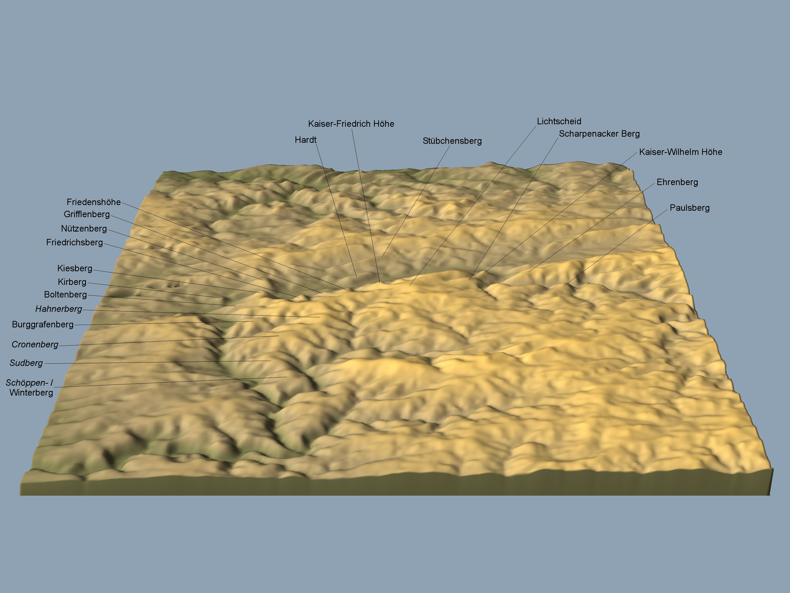 DEM von Wuppertal (auf SRTM3 Höhenwerten basierend) mit einzelnen Erhebungen